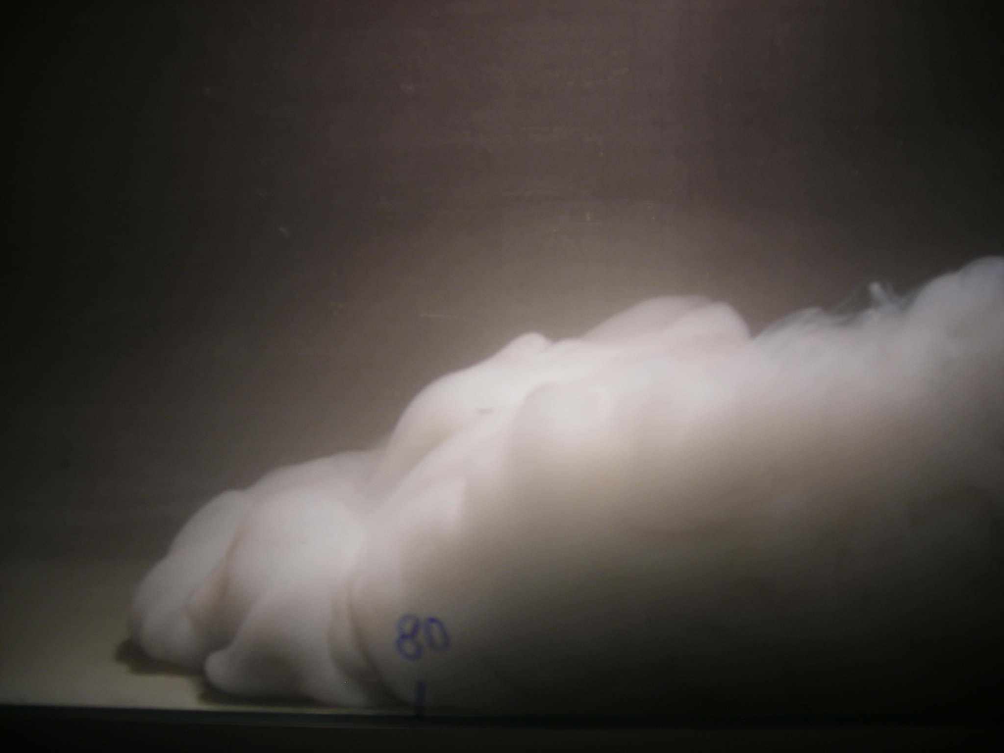 Modellhafte Darstellung eines Suspensionsstroms (Milch im Wasserbecken)